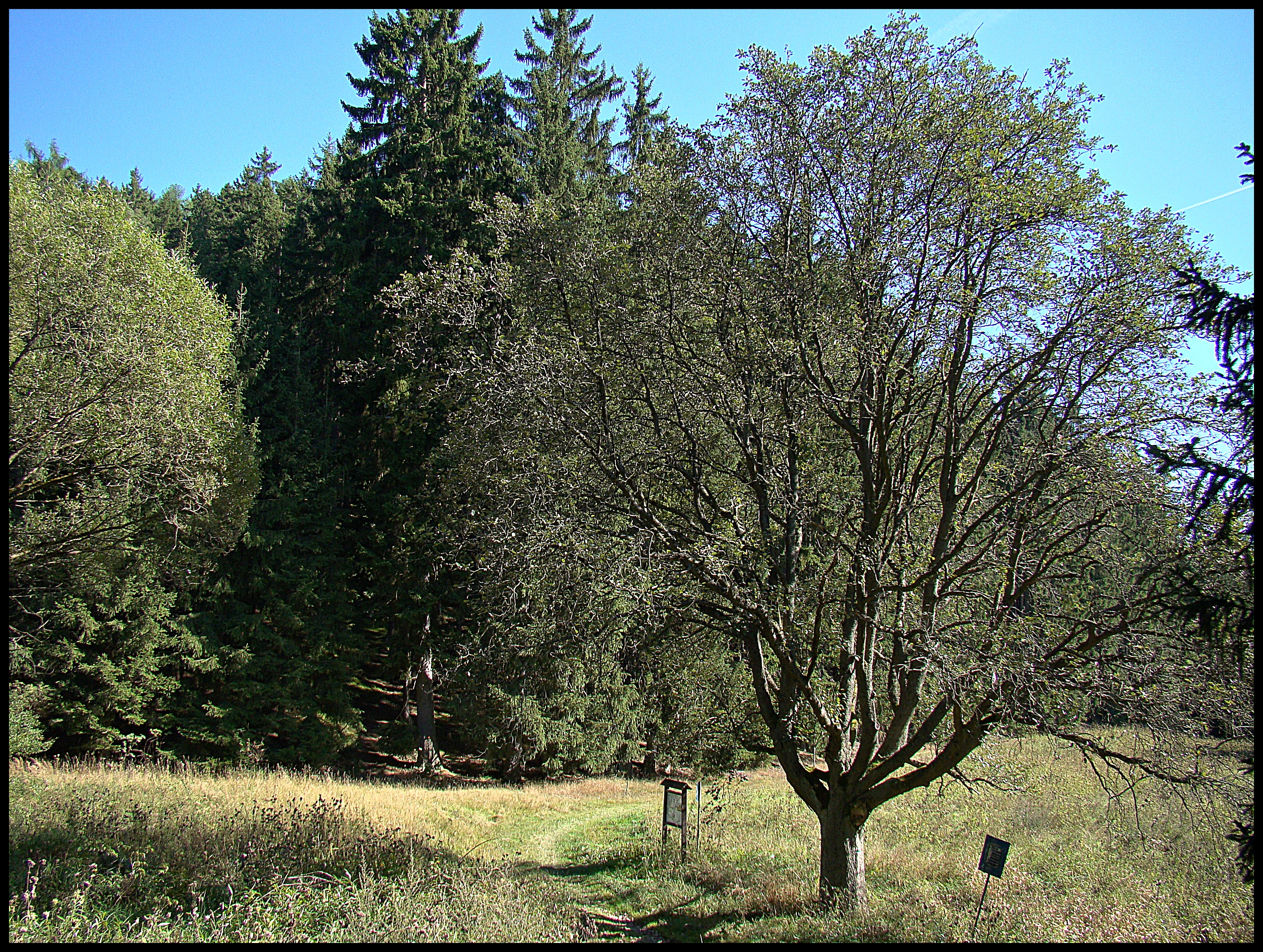 Jeřáb muk u Kosího potoka